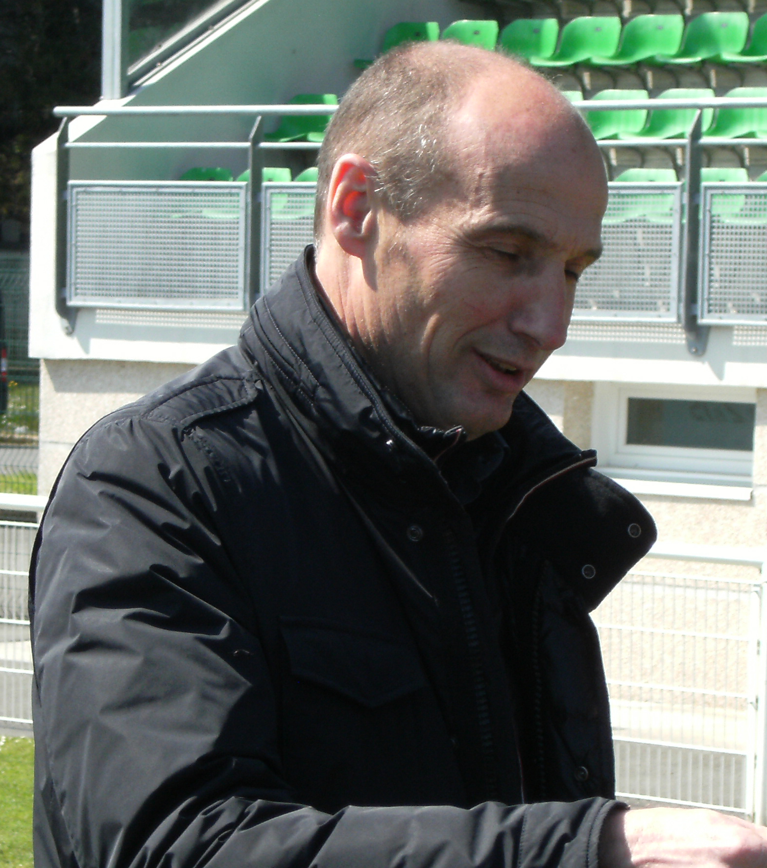 Photo prise lors d'un entraînement du Stade rennais au stade de Marville de Saint-Malo le 3 mai 2013. Ici, Pierre Dréossi